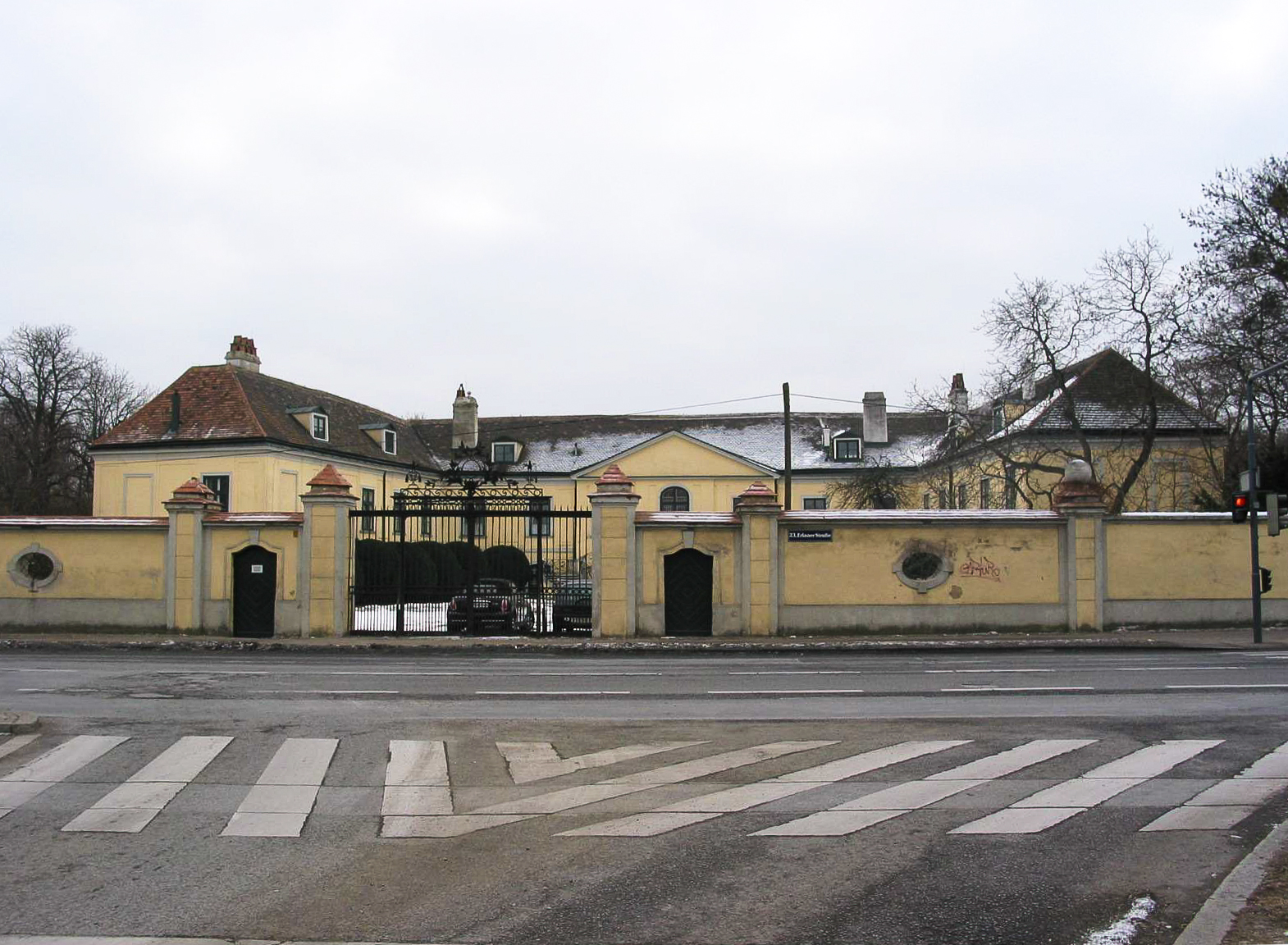 de: Schloss Alterlaa en: Palace of Alterlaa